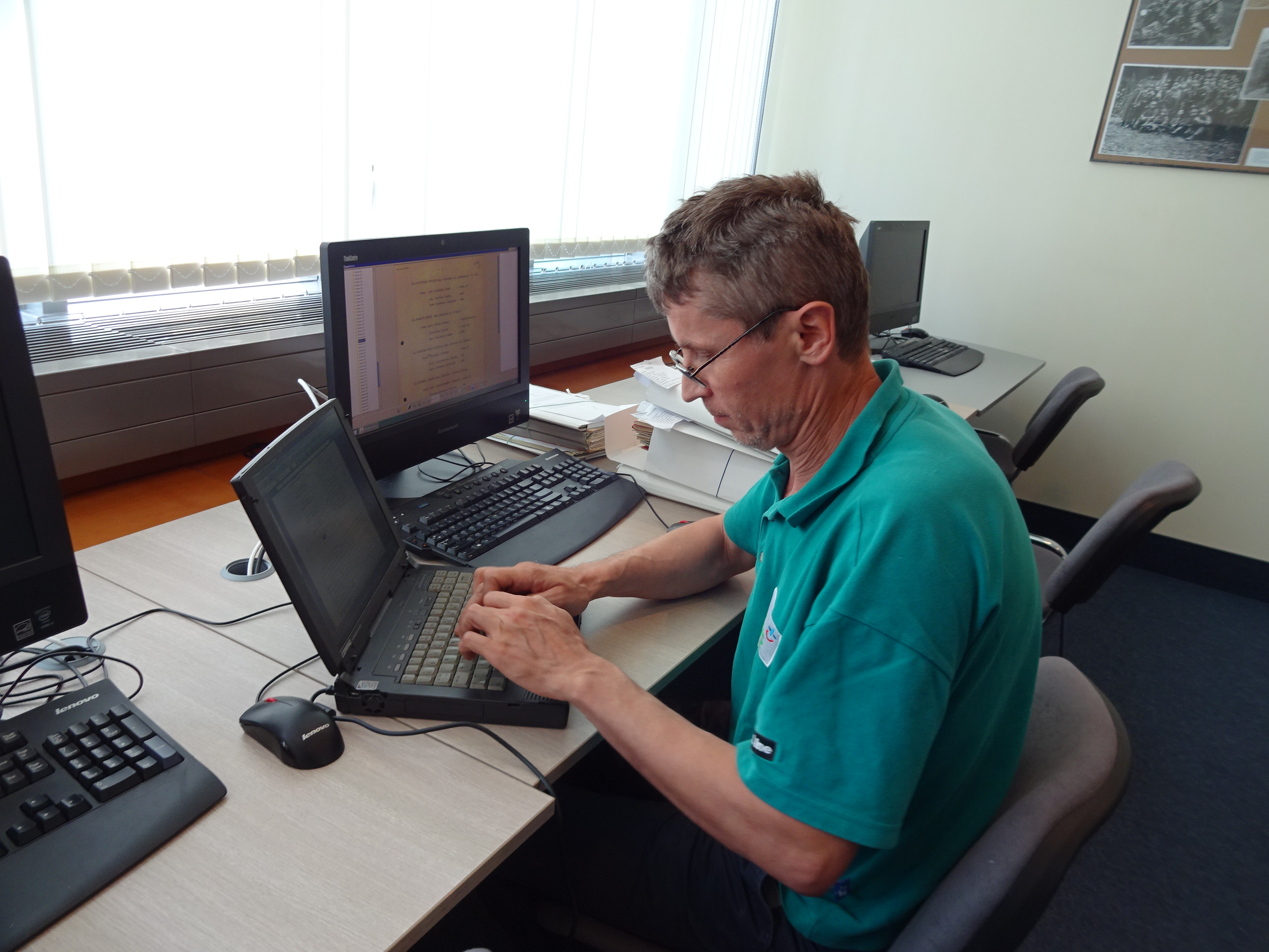 Jan Mironczuk in IPN, Pl. Krasińskicch 2, 2017-06-30